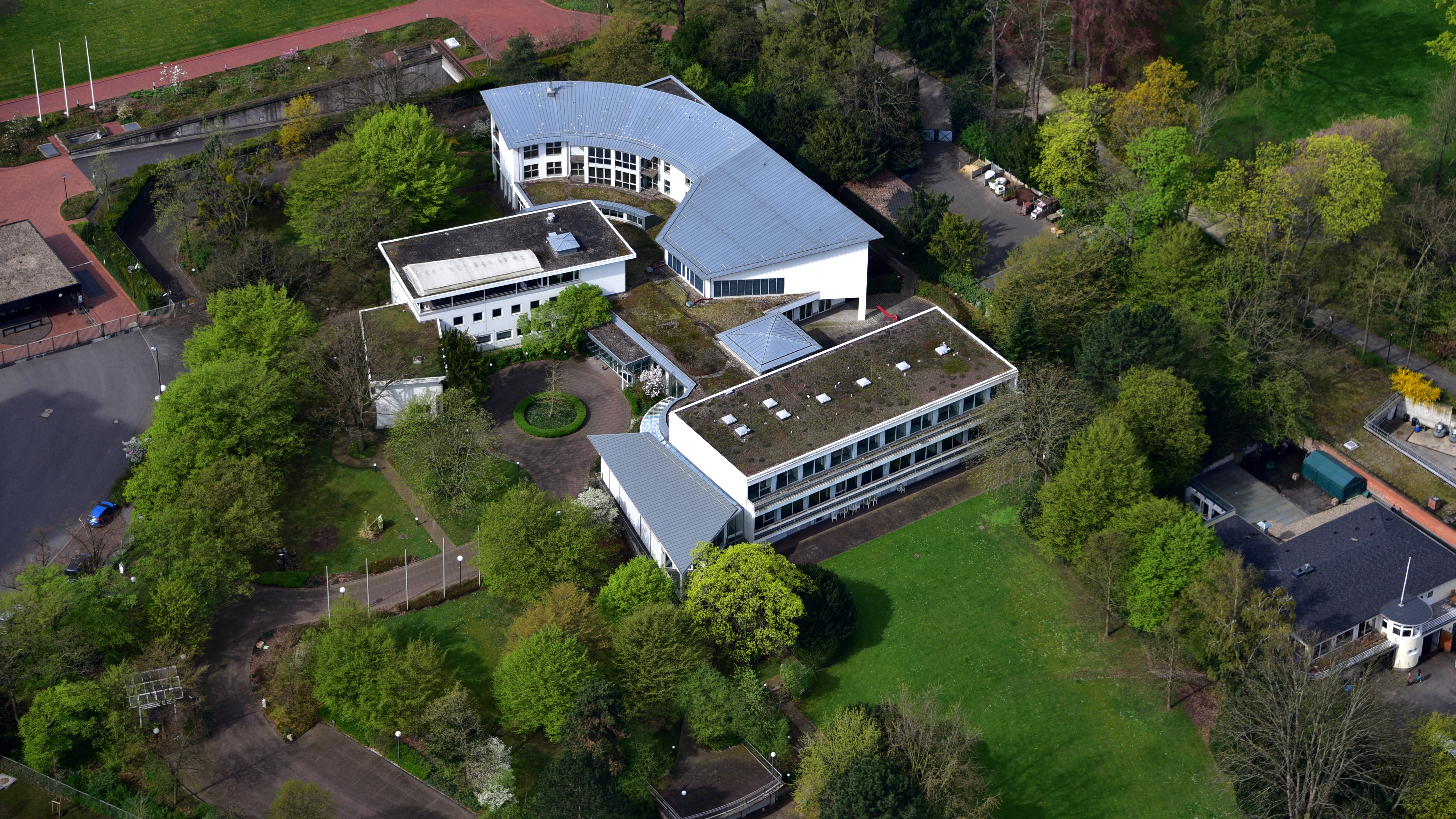 Ehemalige Landesvertretung Nordrhein-Westfalen, Dahlmannstraße 2, Bonn-Gronau: Luftaufnahme (2018); links im Anschnitt der Hauptzugang des ehemaligen Bundeskanzleramts